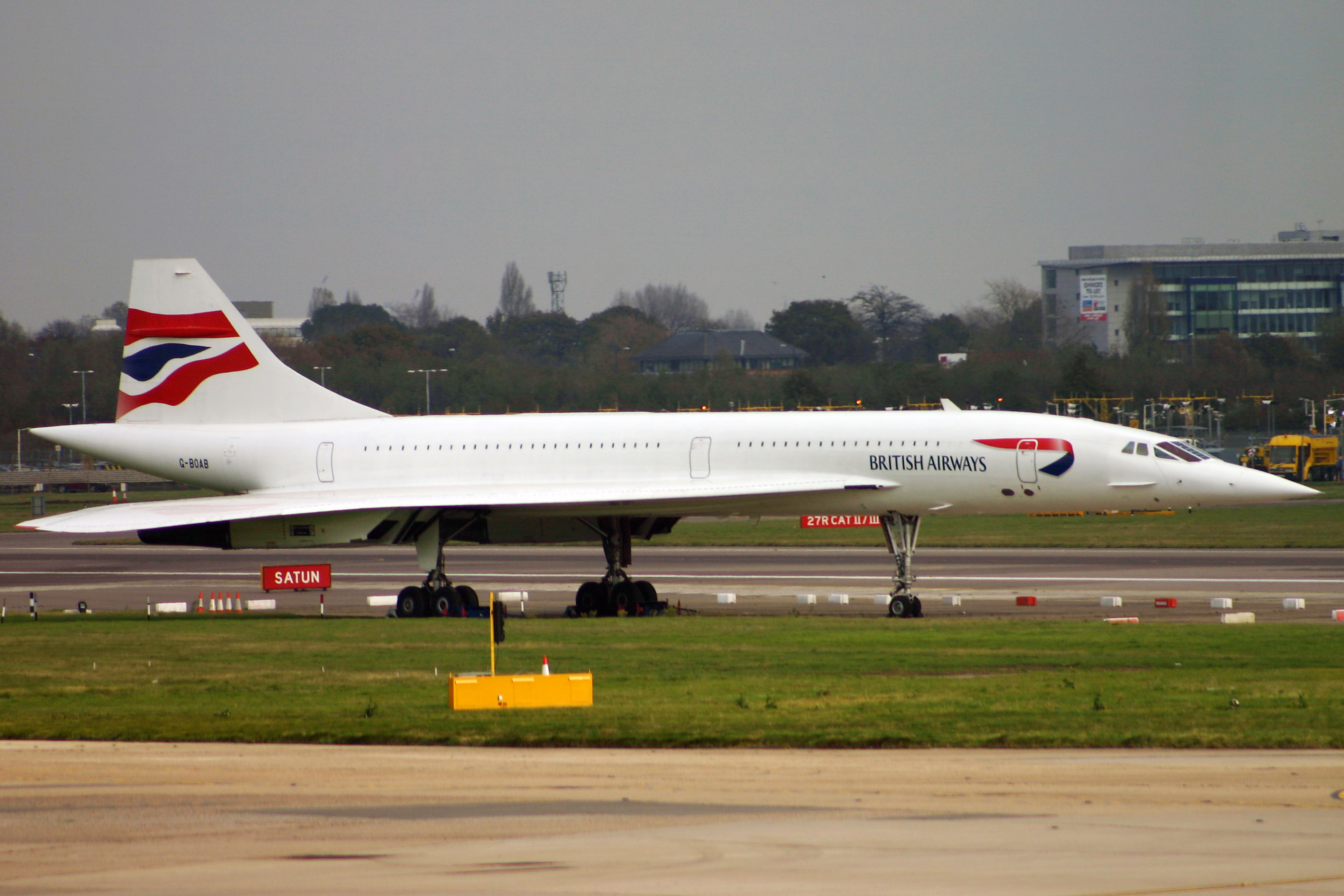 egll, LHR